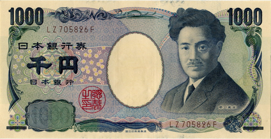 Series E 1000 Yen Bank of Japan note. Portrait: Hideyo Noguchi. First issued in 2004. 150mm x76mm.